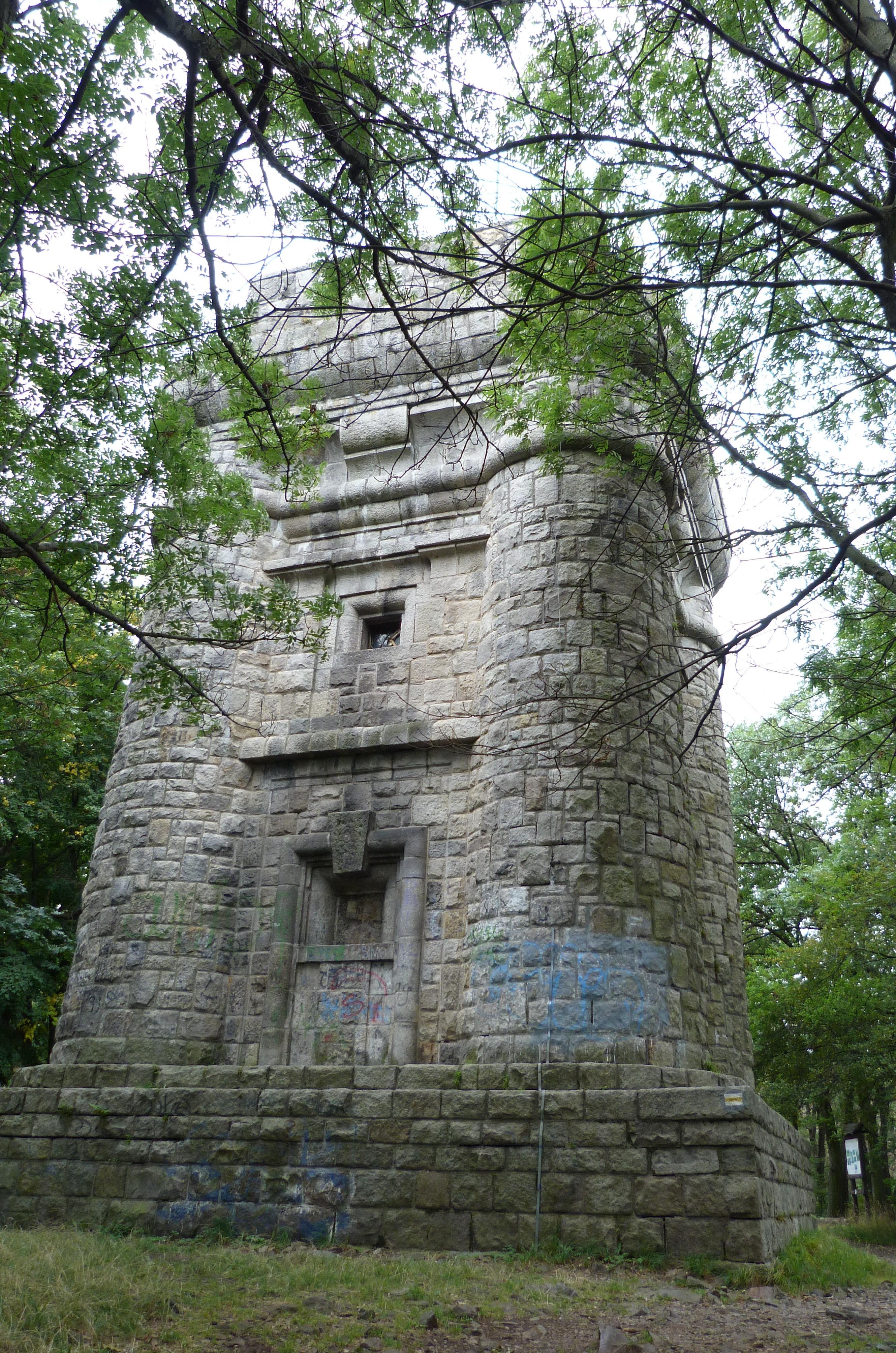 Park krajobrazowy: Ślężański Park Krajobrazowy This is a photography of protected area with CRFOP ID PL.ZIPOP.1393.PK.108